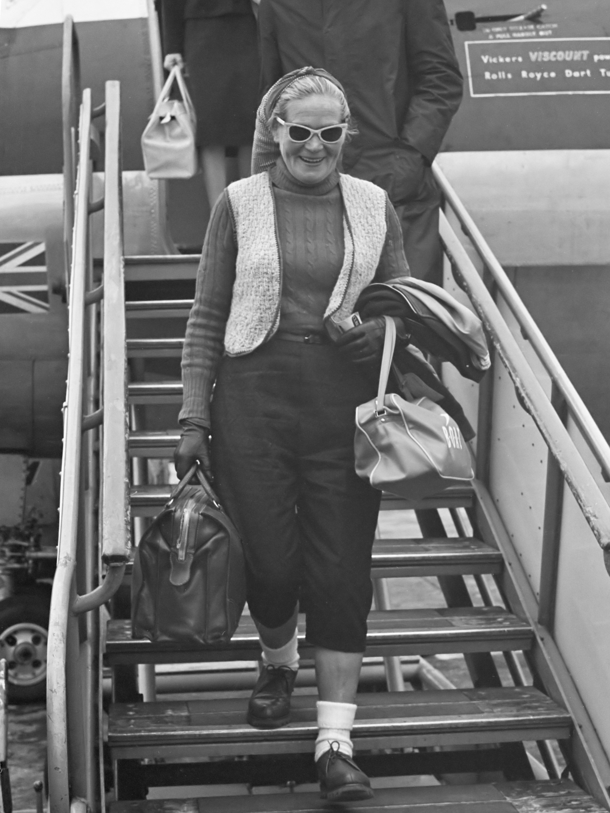 Aankomst Britse langeafstand wandelaarster dr. Barbara Moore op Schiphol